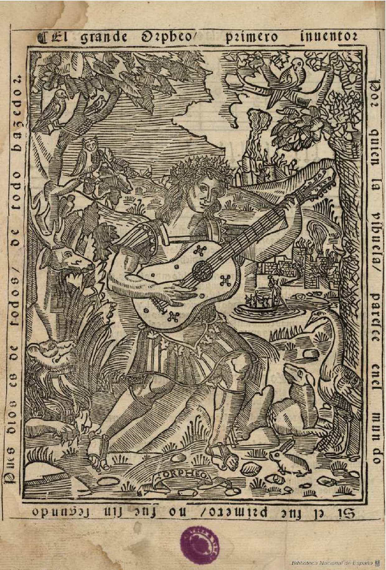 Orfeu tangendo a viola de mão. Ilustração do "El maestro" de Luís Milán (1536).